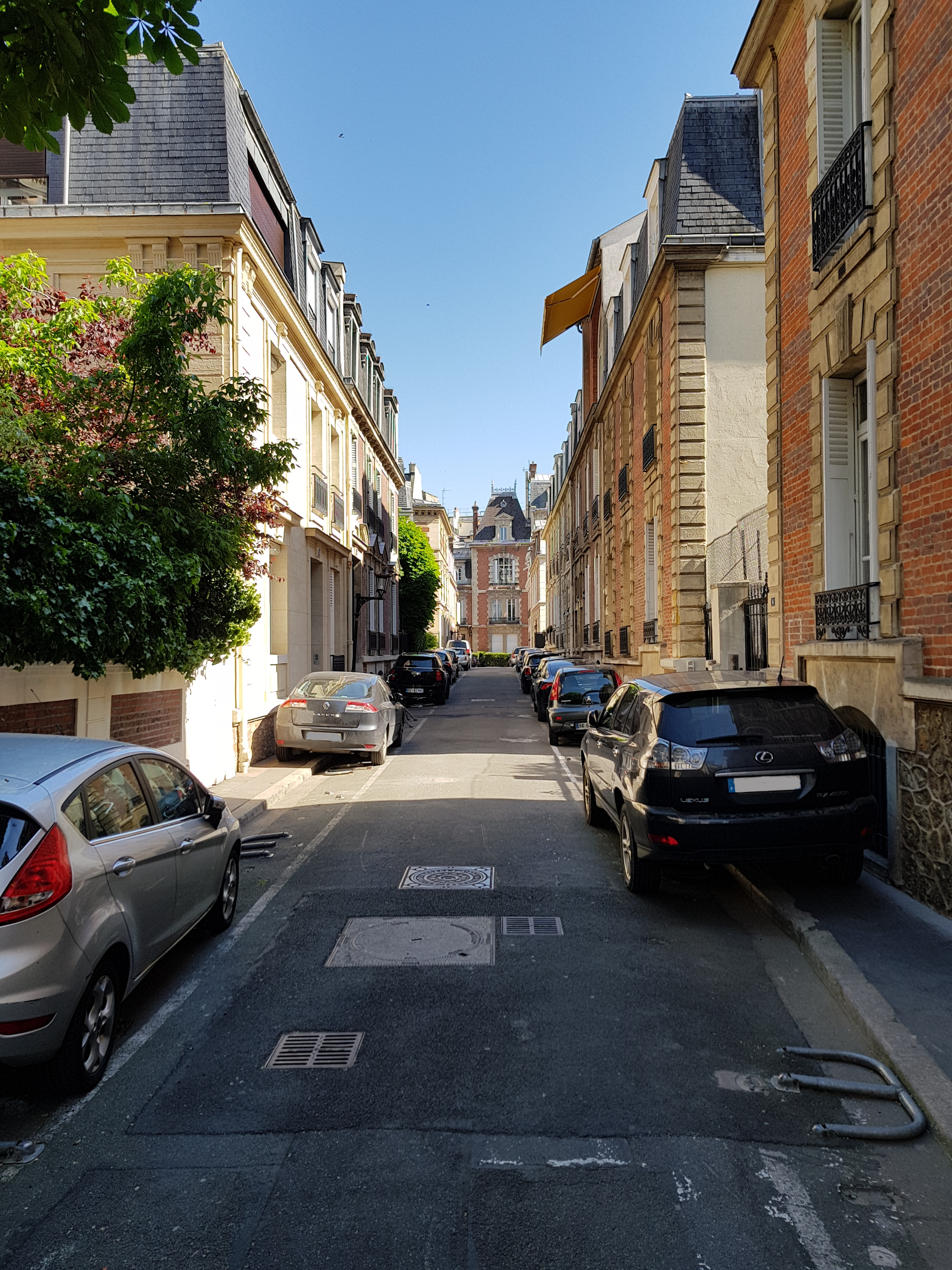 Avenue Jules-Janin, Paris 16e.